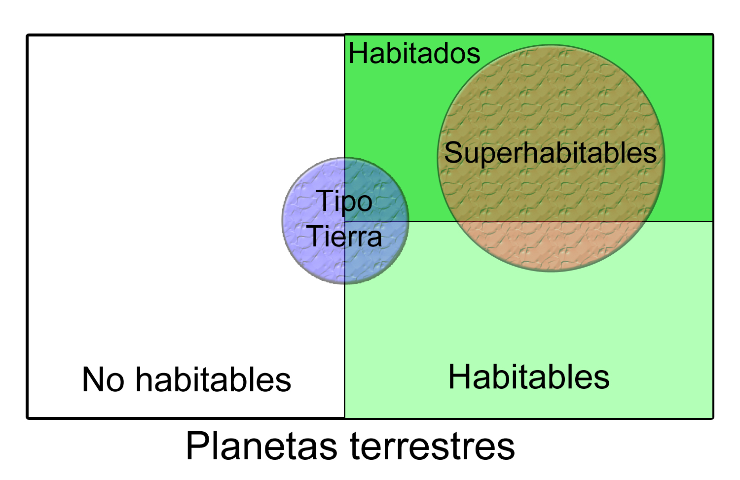 Proporción de planetas terrestres.